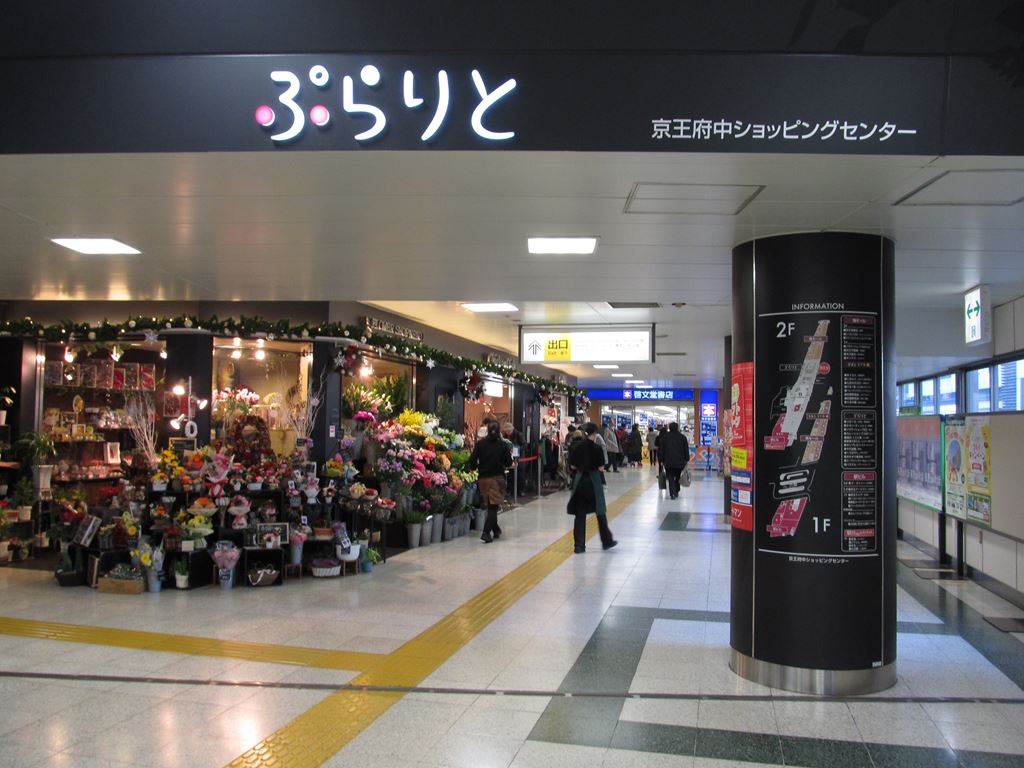 ぷらりと府中ショッピングモール